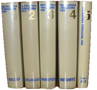 Encyklopedia powszechna PWN (1973-1988), wszystkie tomy.